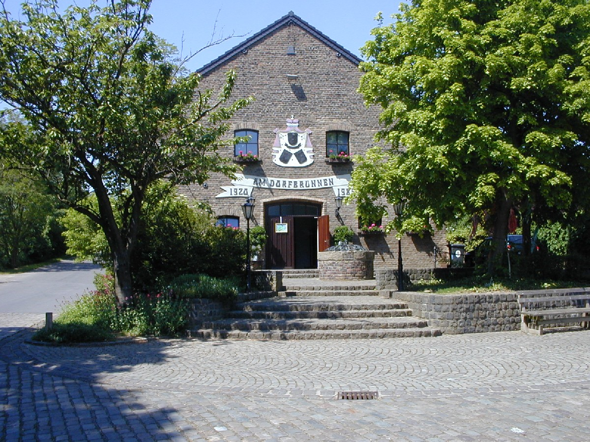 freigegeben durch das Presseamt der Gemeinde Nörvenich am 08.02.05, GNUF